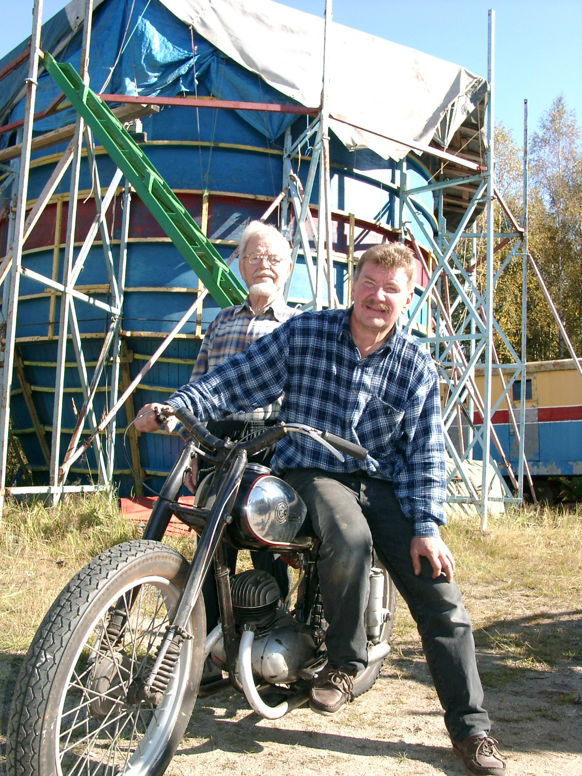 Surmanajajat Onni ja Kalevi Suuronen entisen surmanajopyttynsä edessä. Kalevi etualalla surmanajopyöränsä selässä.